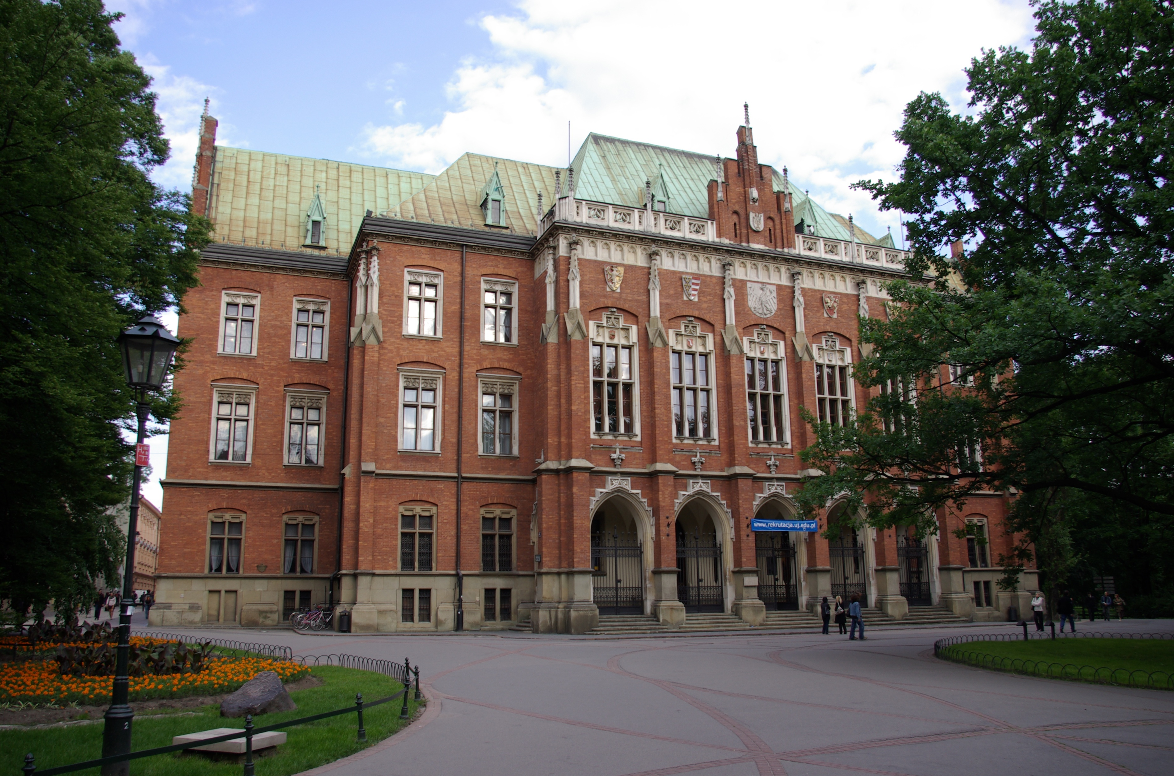 Collegium Novum w Krakowie